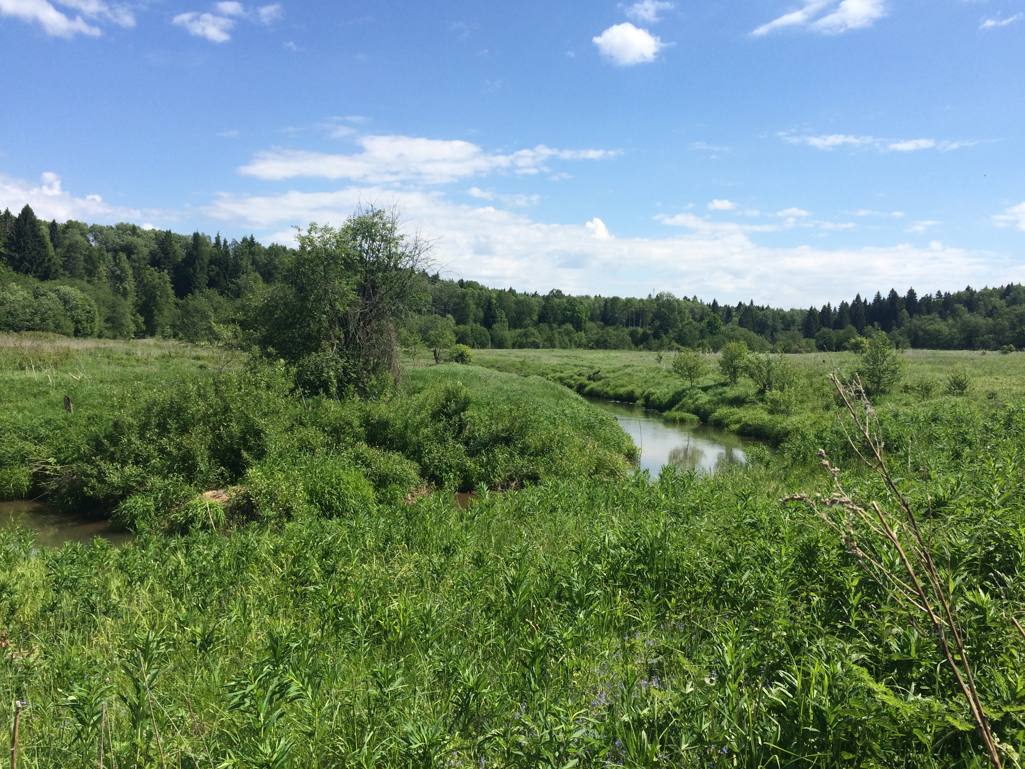 Вид на реку Веля в окрестностях Святогорово по пути к Кресту.